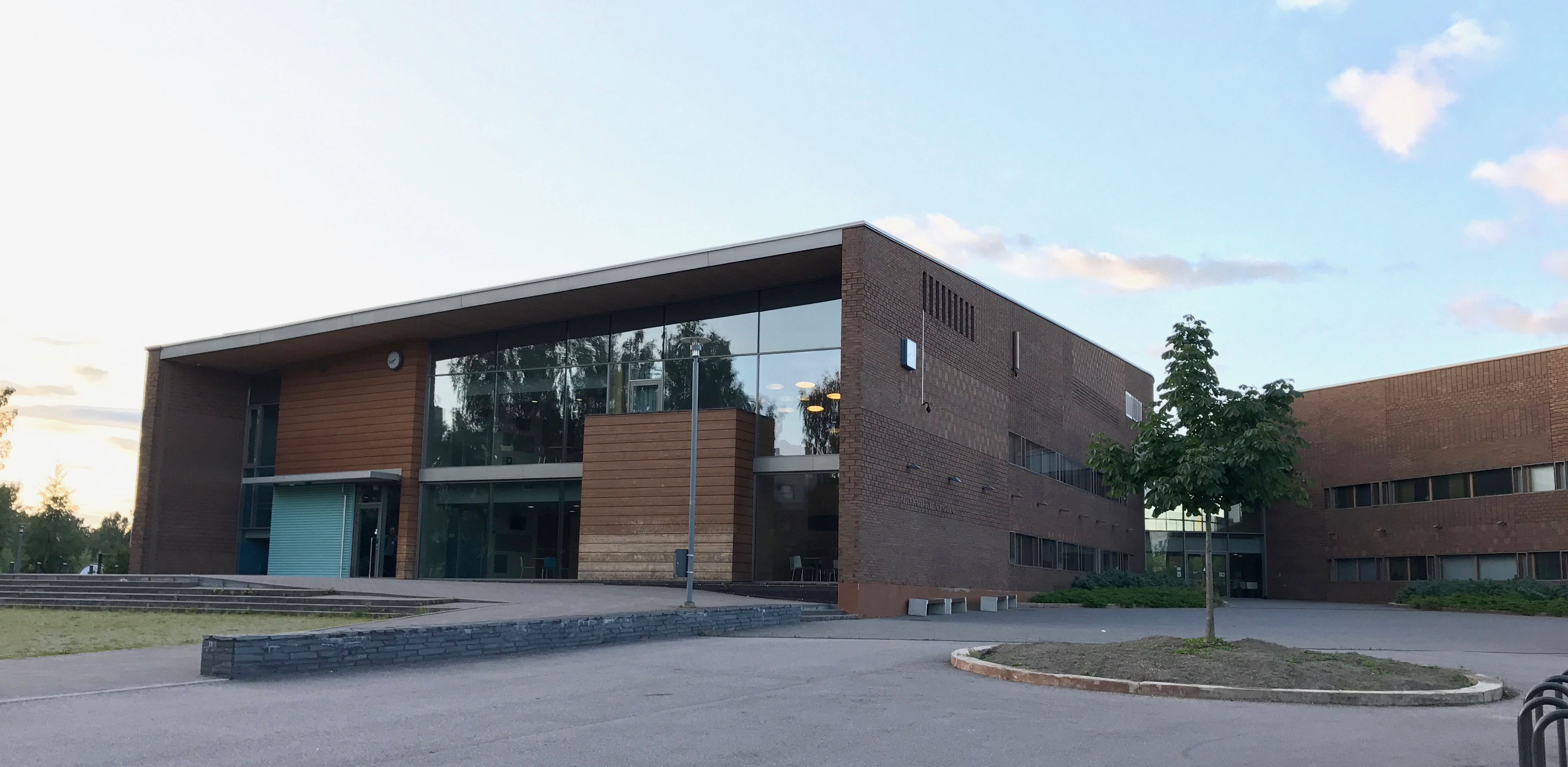 Kirkkojärven koulu Espoossa.